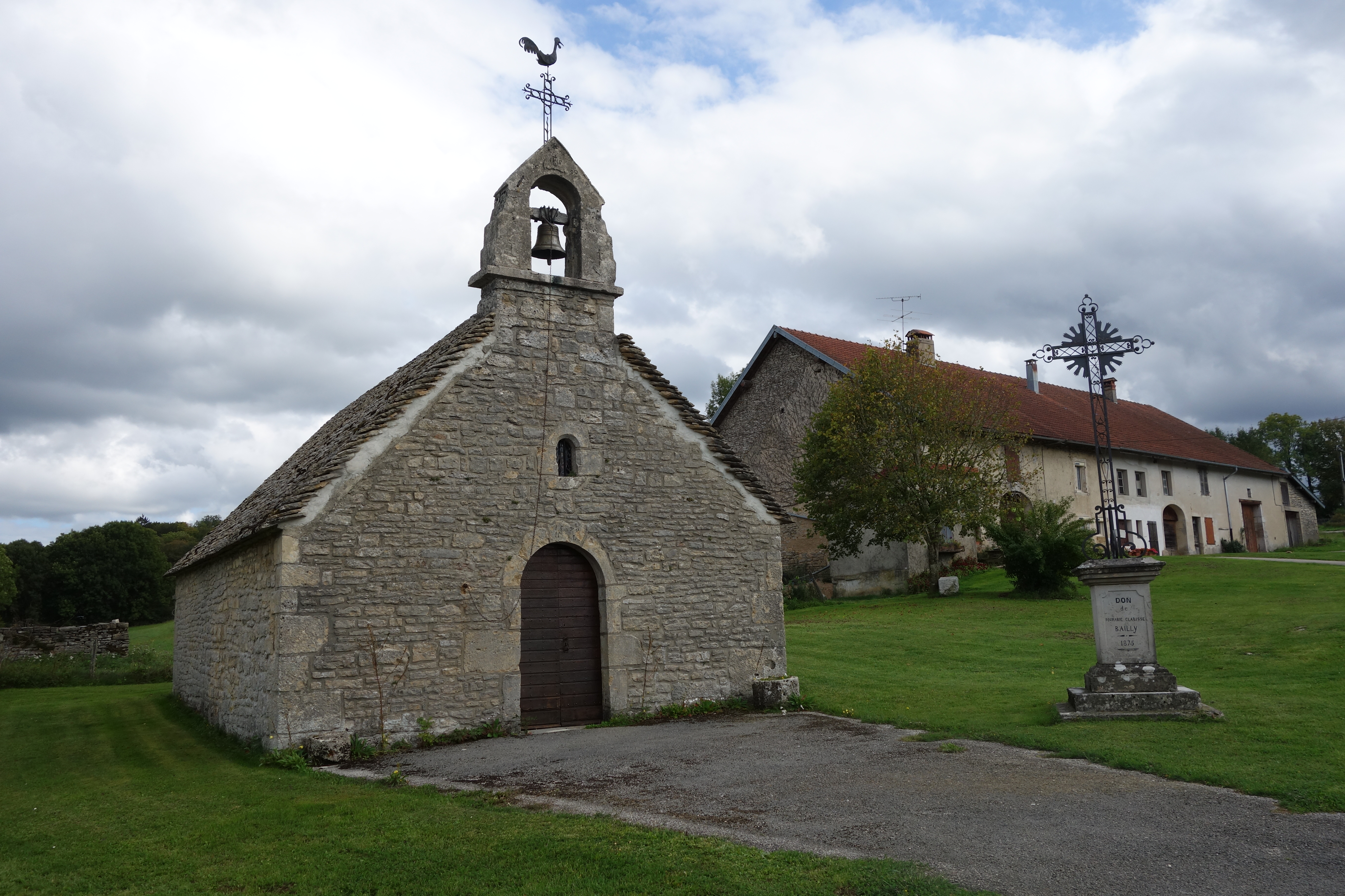 Uxelles - chapelle du XIXe s. - Jura